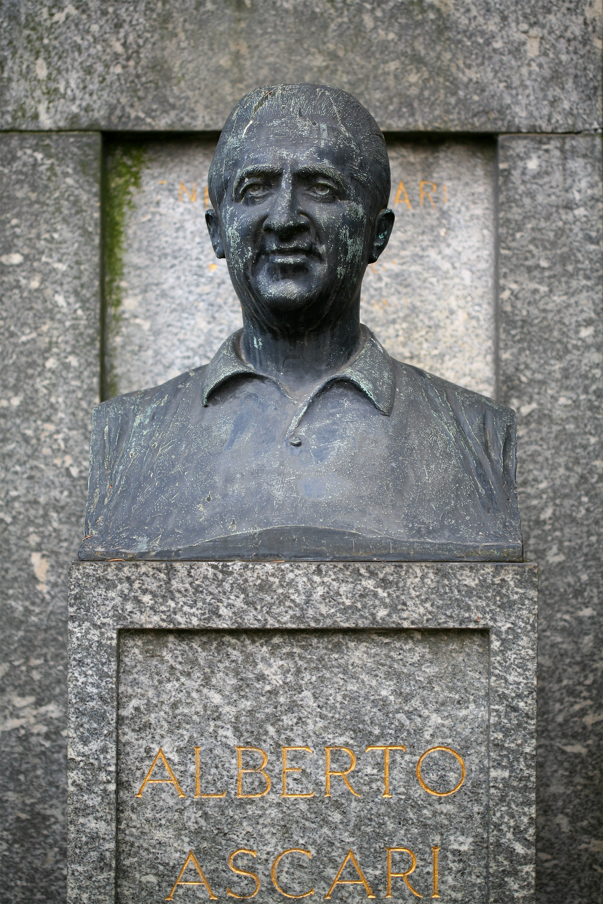 Busto di Alberto Ascari al Cimitero Monumentale di Milano (Michele Vedani (1874-1969), 1955) nel 2014; il busto venne sottratto da ignoti nel 2016